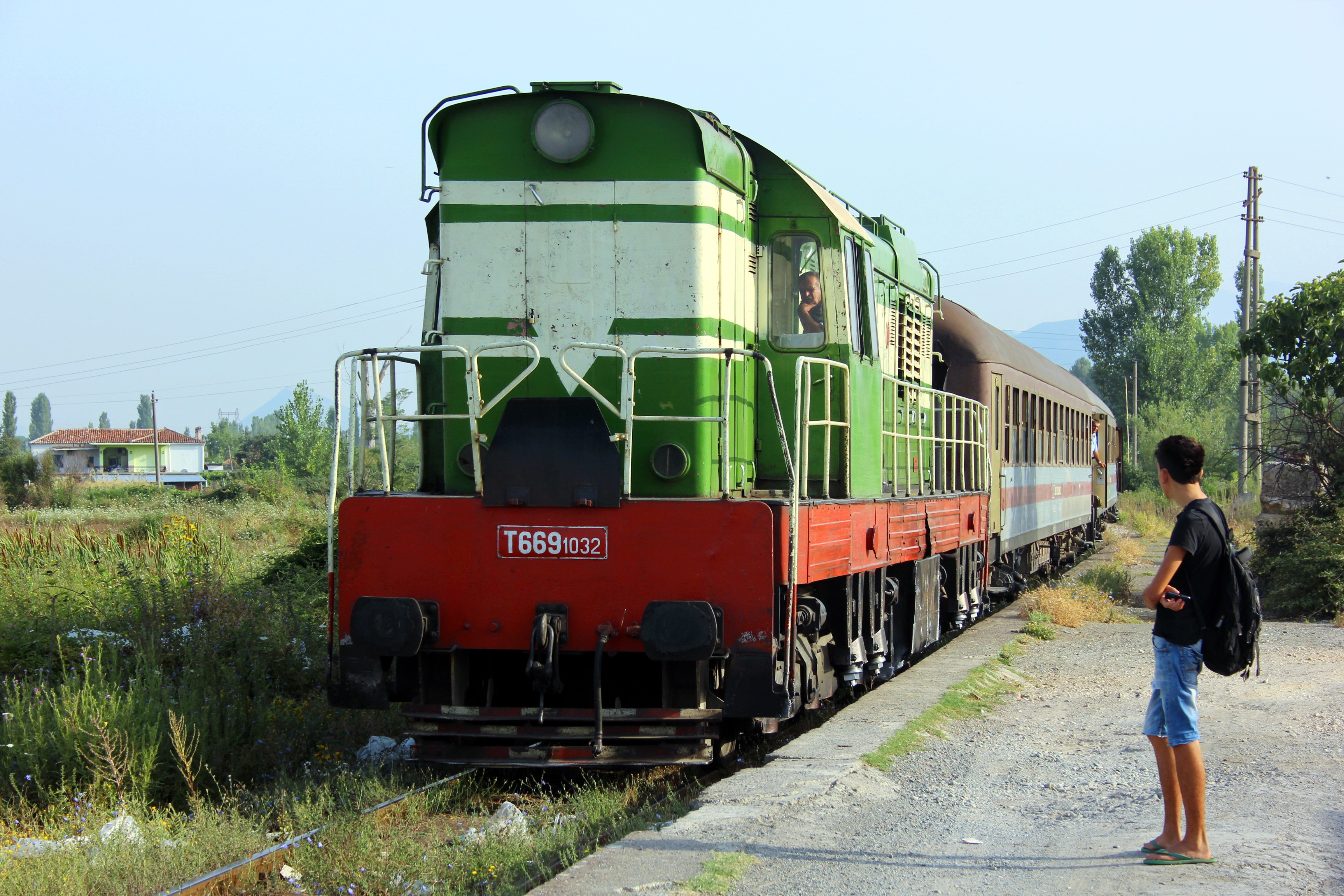 HSH T669 im Bahnhof Lac in Albanien.